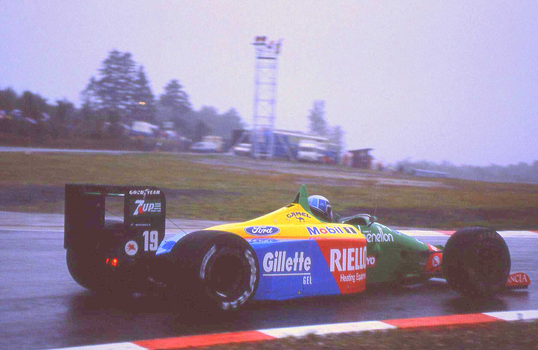 Alessandro Nannini - Benetton-Ford. Scan diapo argentique.